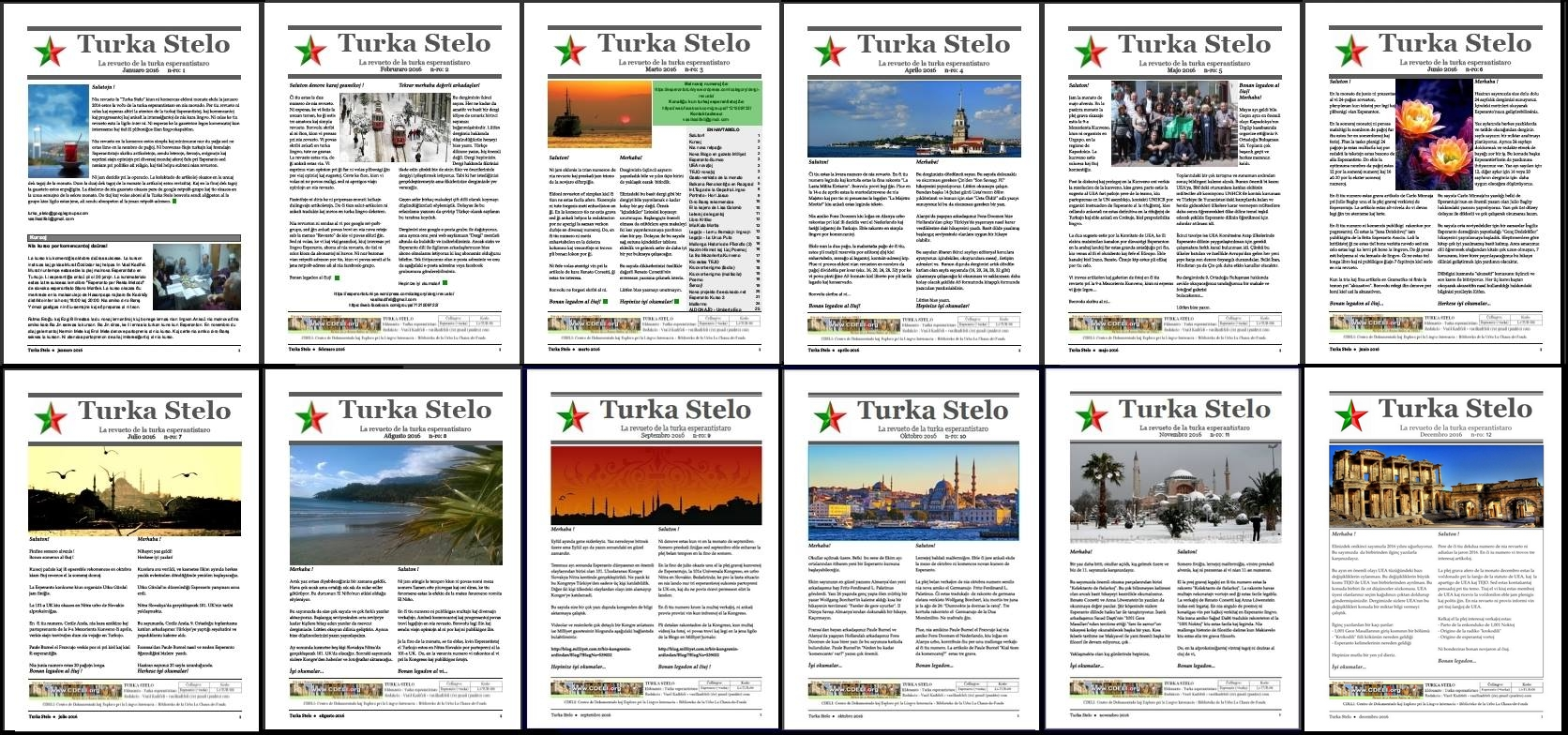 Turka Stelo jarkolekto 2016